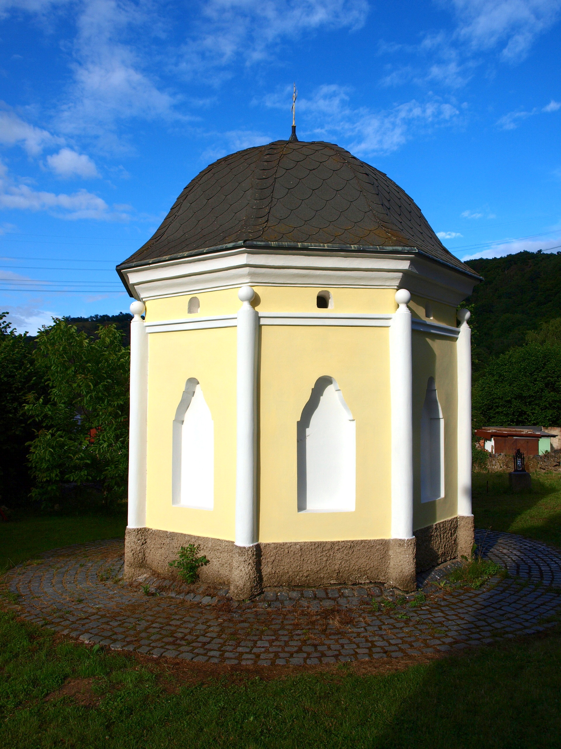 Vrané nad Vltavou, márnice u kostela sv. Jiří